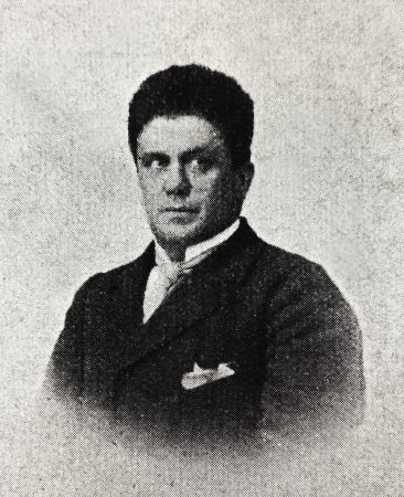 Greek Tenor Ioannis Apostolou (1860-1905)